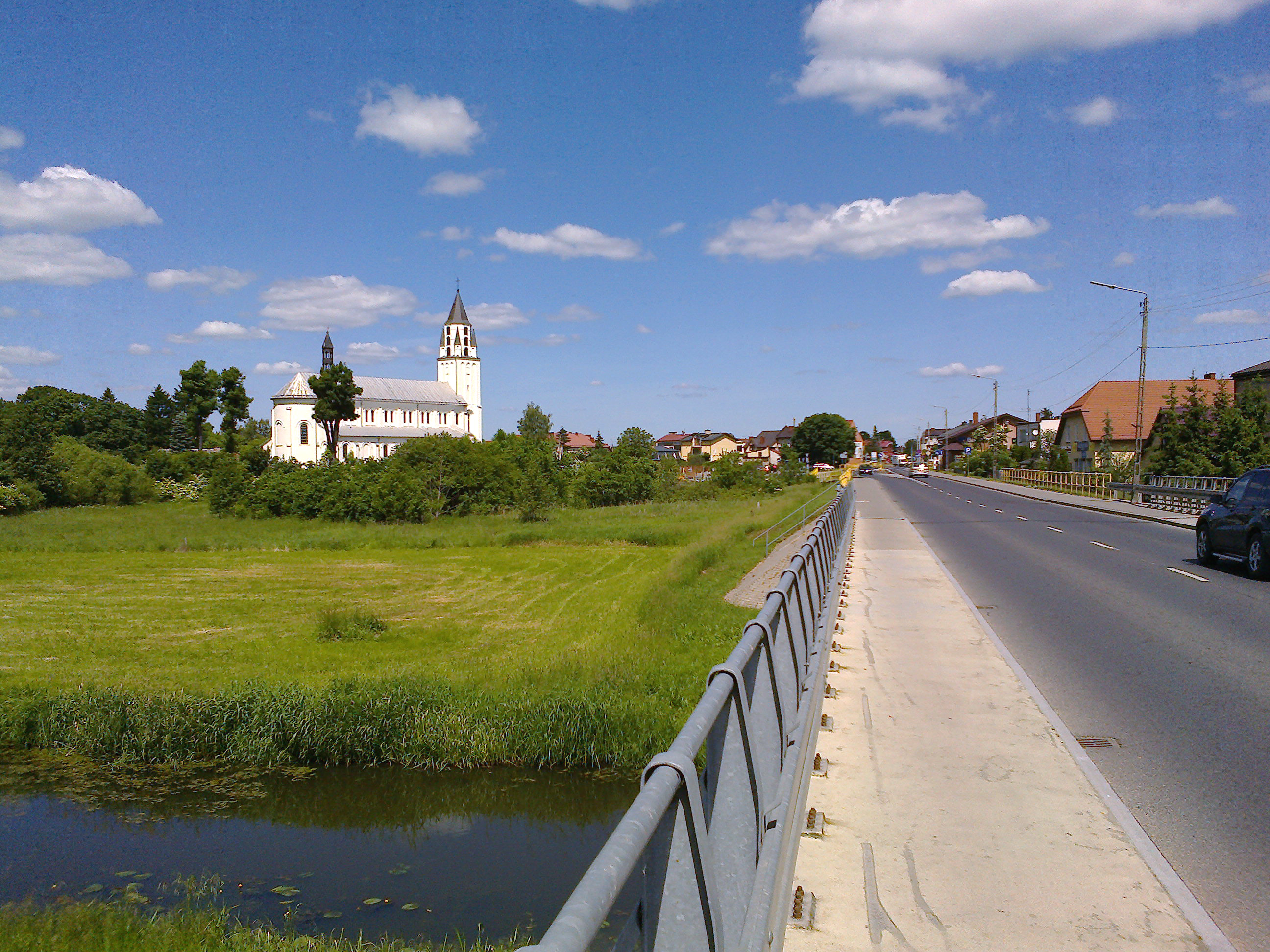 Chorzele (powiat przasnyski)